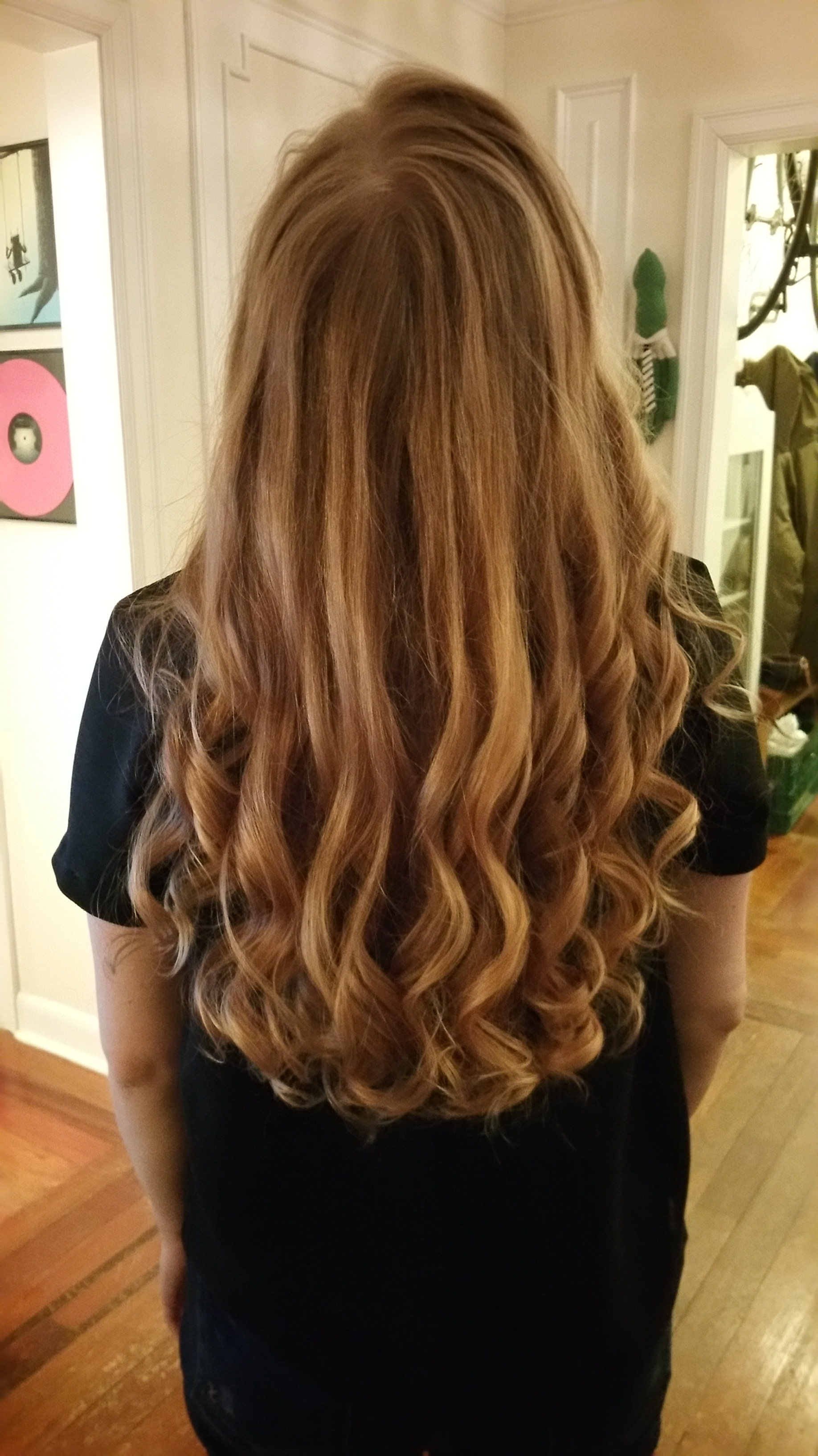 Birthday Hair